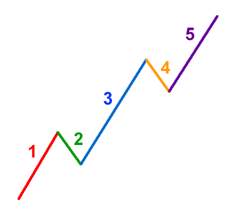 中文（中国大陆）: 驱动浪的5种形态